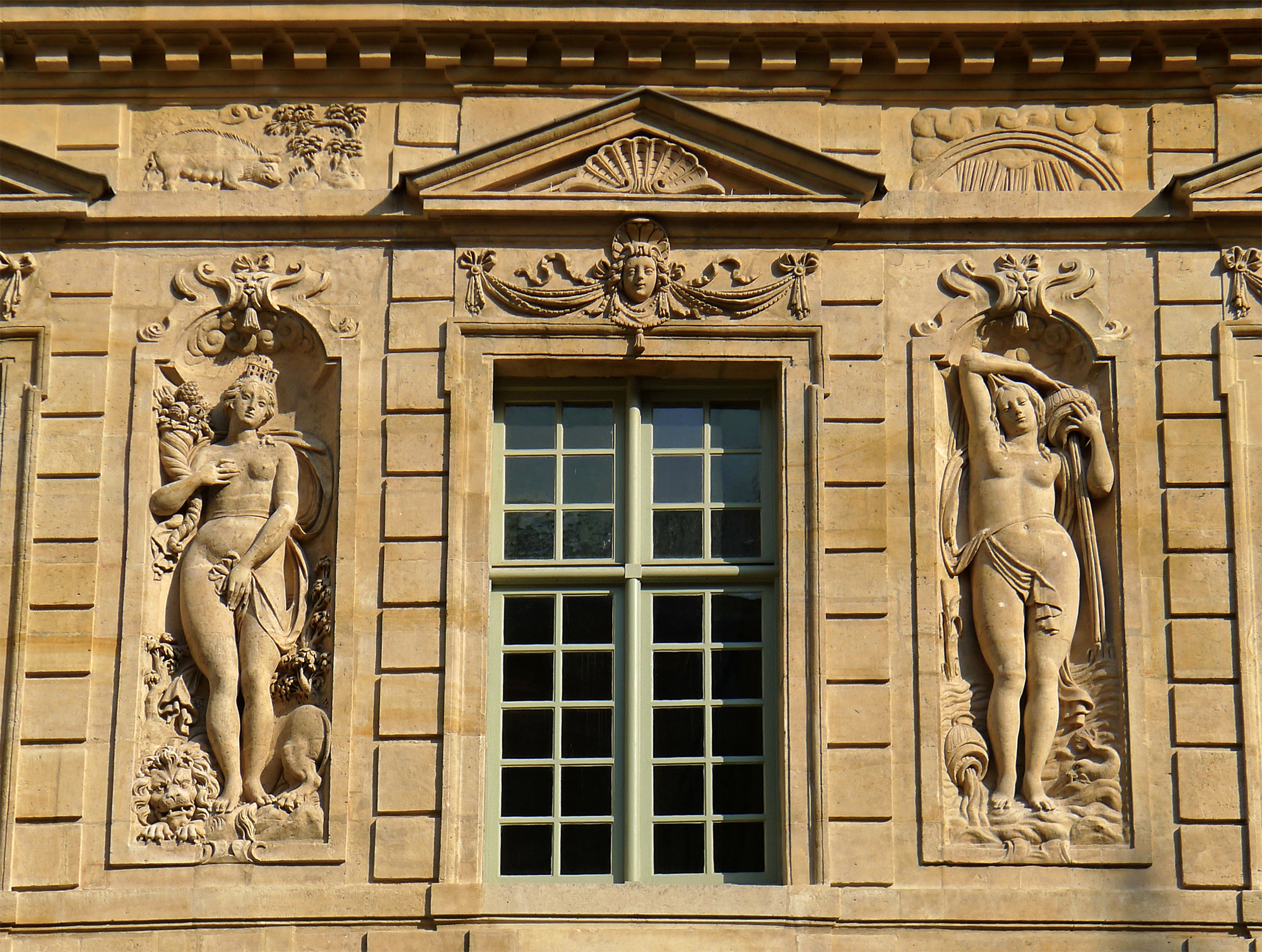 Hôtel de Sully (Classé) - Paris IV .